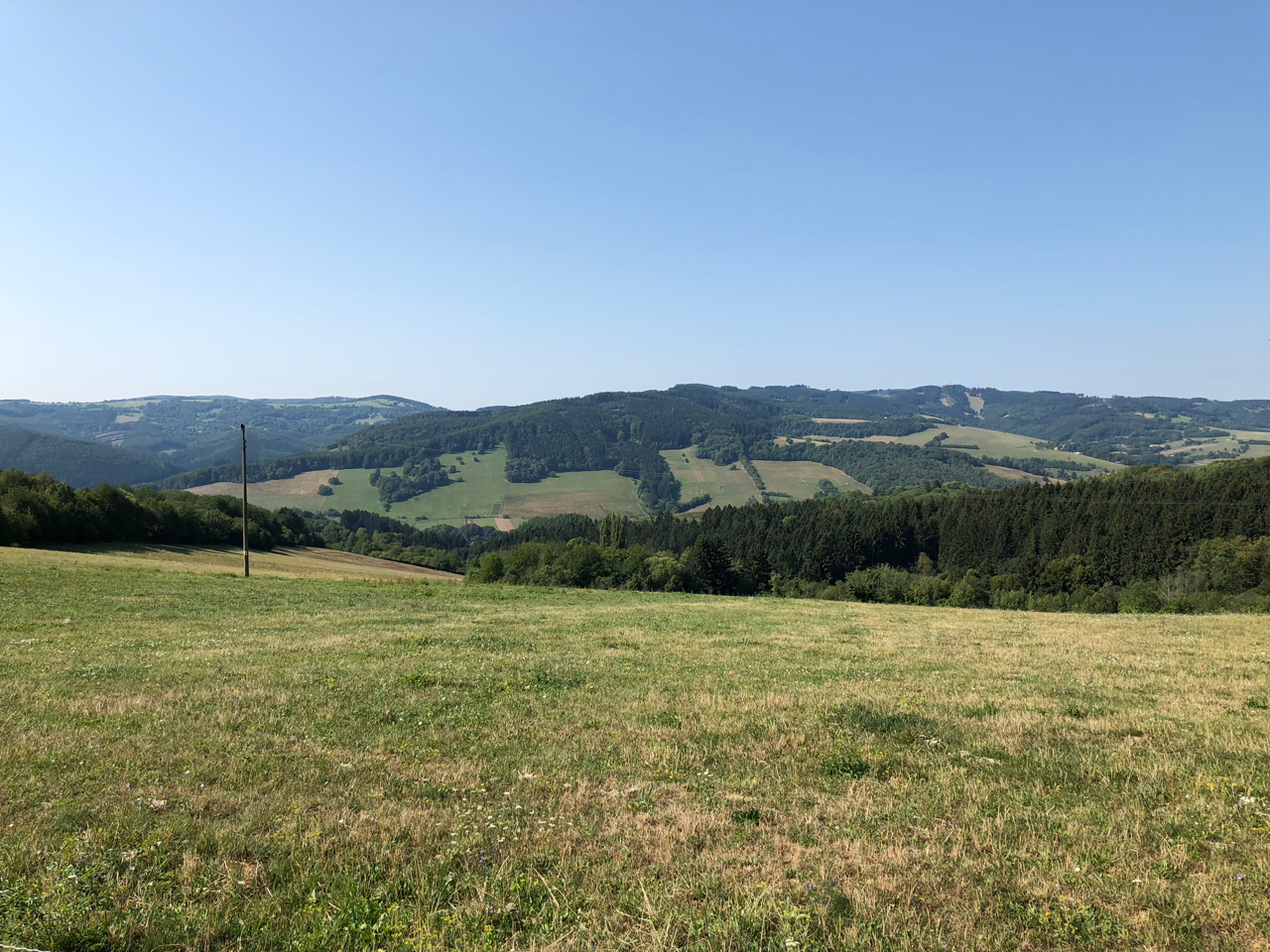 Pohled na okolí obce Žítková směrem na Starý Hrozenkov